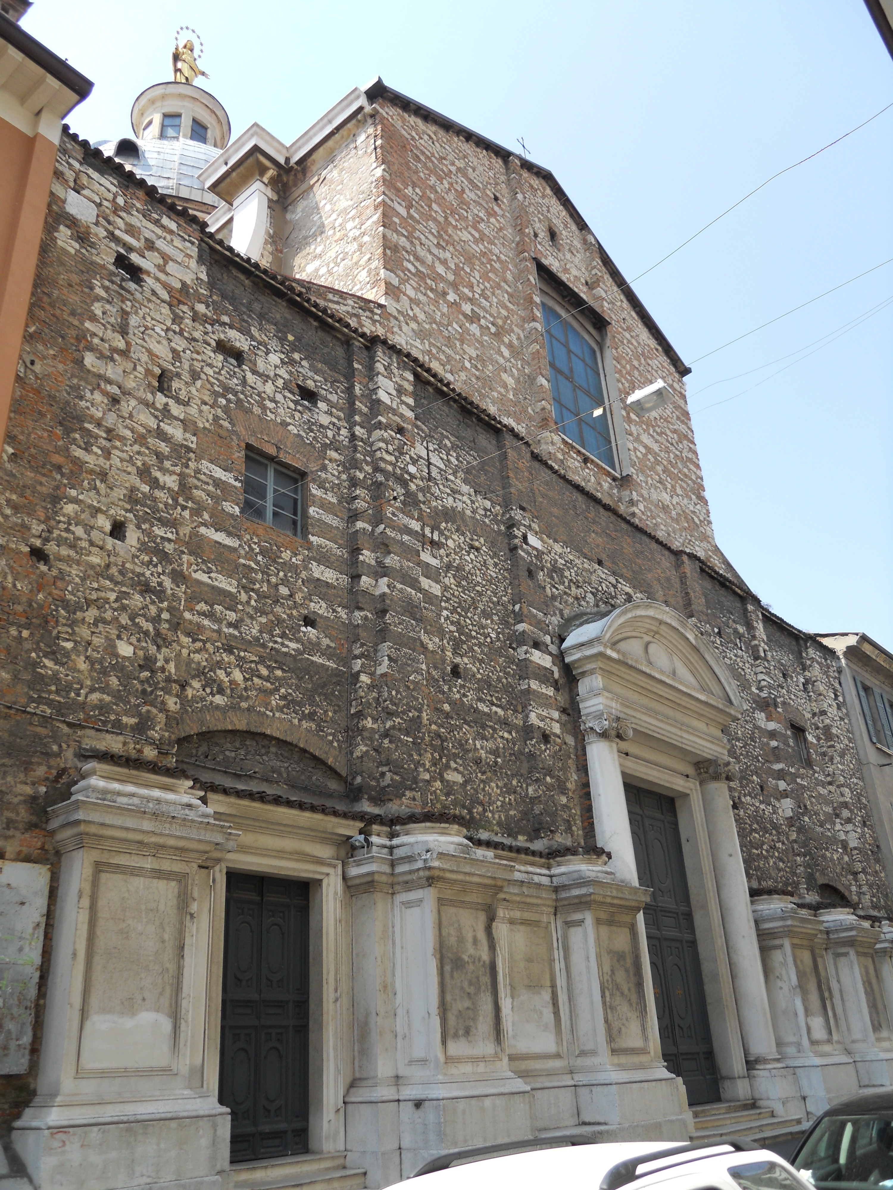 santa maria della pace (brescia) facciata.jpg